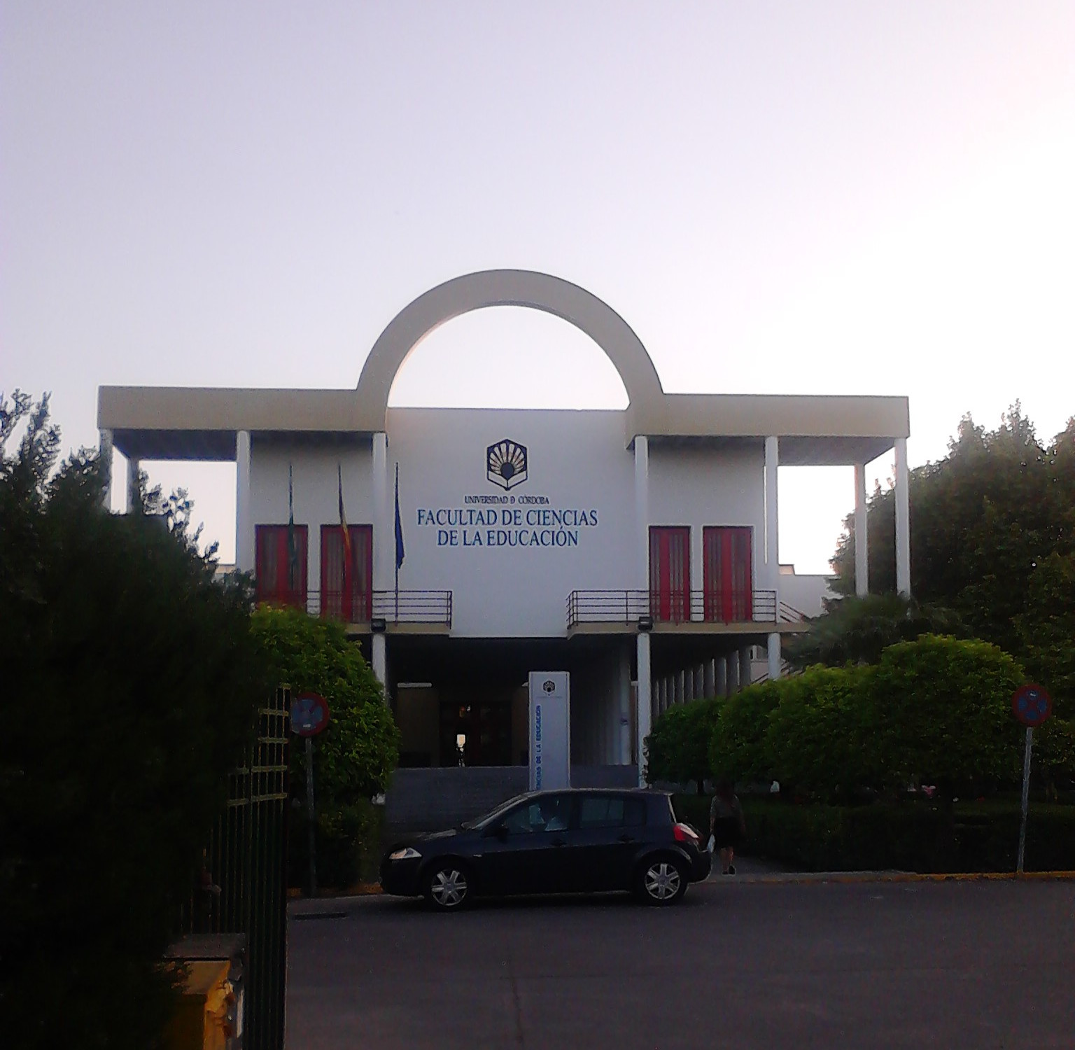 Facultad de Ciencias de la Educación de la Universidad de Córdoba (España).